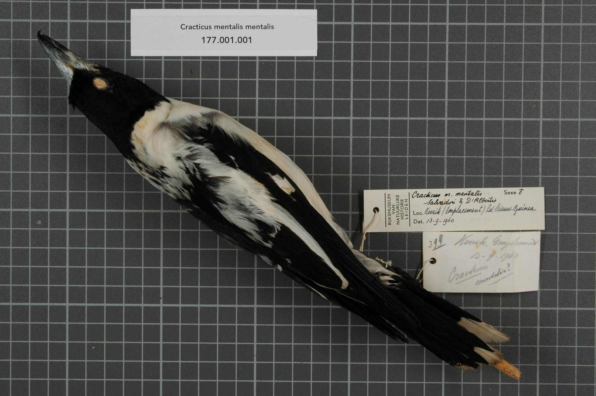 Cracticus mentalis mentalis Salvadori & D'Albertis, 1876